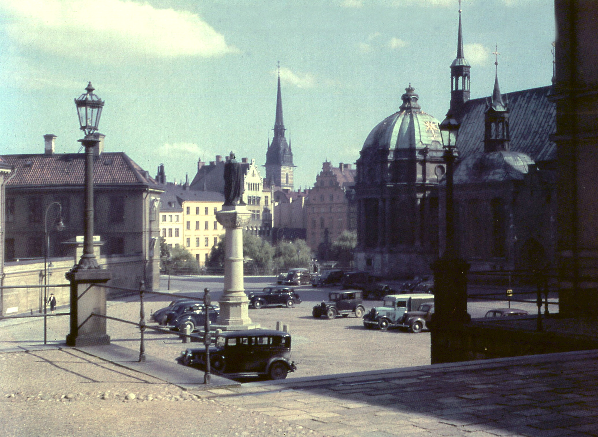 Birger Jarls torg 1938 med Tyska kyrkan i bakgrunden